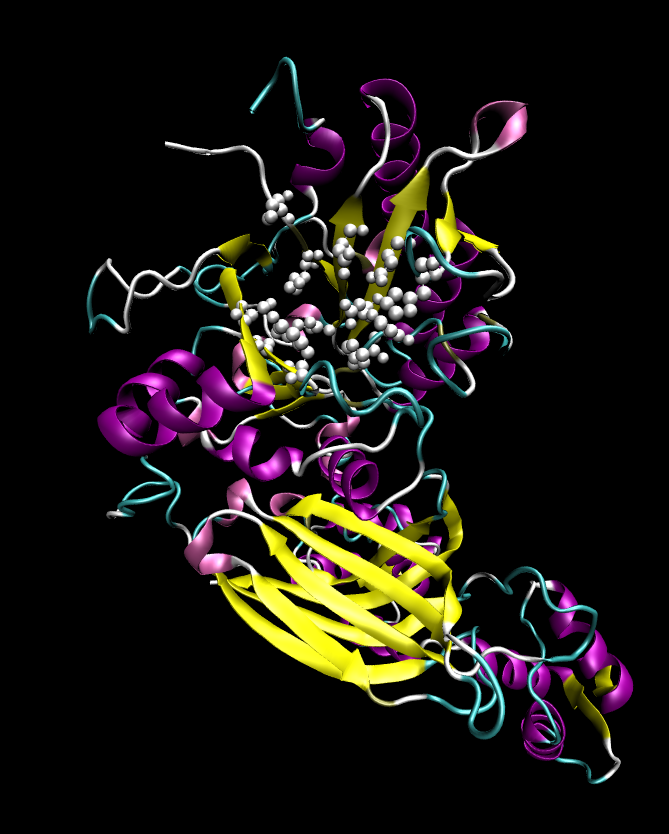 Selbst erstellt mit VMD/PovRay/xv aus pdb ID 1DJX